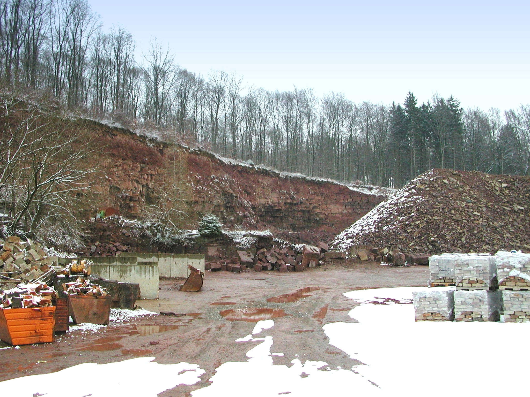 Buntsandsteinbruch oberhalb der Hannoverschen Klippen im Solling